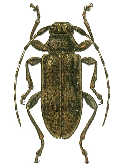 Oplosia cinerea (Hoplosia fennica)